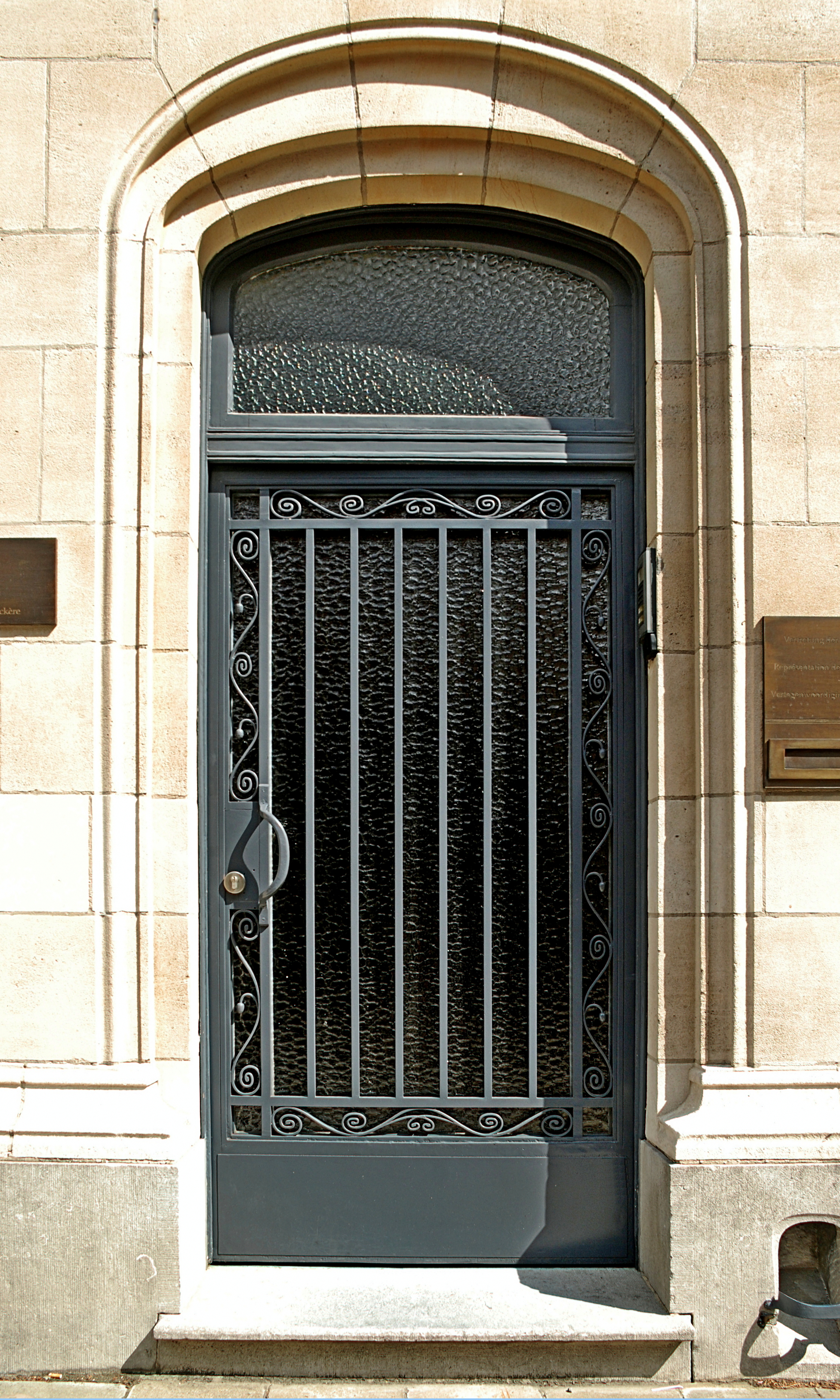 Belgique - Bruxelles - Hôtel De Brouckère